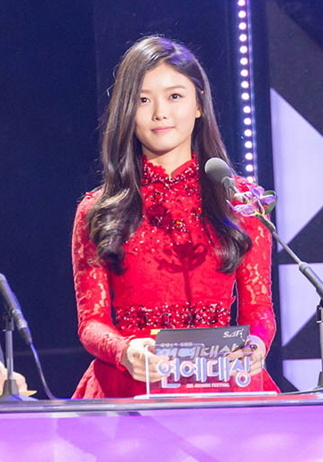 14.12.30 sbs 연예대상 김유정